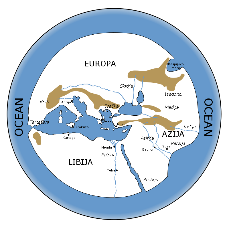 Rekonstruirana karta svijeta prema Hekateju Milećanskom (6. st. pr. Kr.)